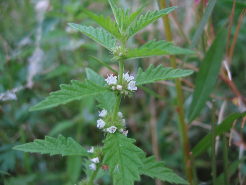 Ufer-Wolfstrapp Lycopus europaeus